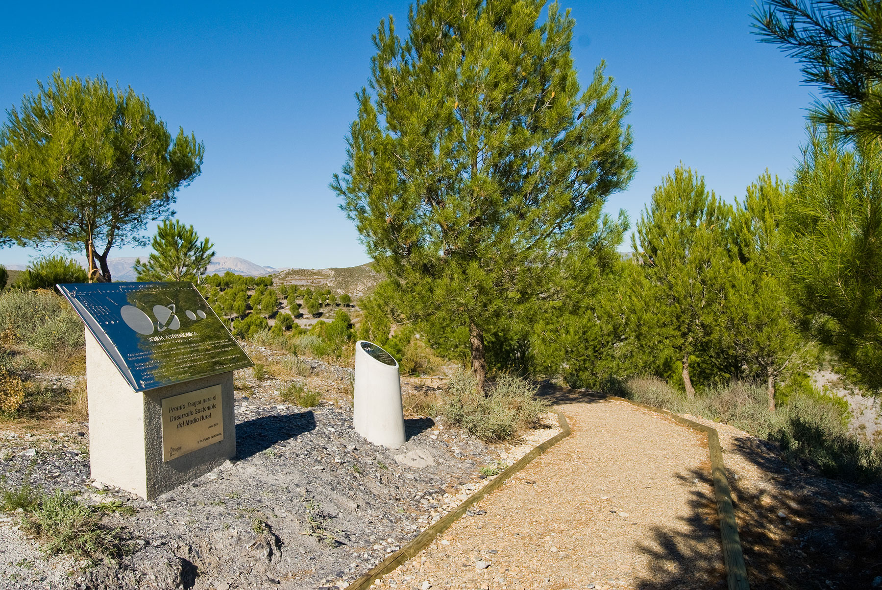 Detalle del recorrido del sendero astronómico situado en el Cabezo de la Jara